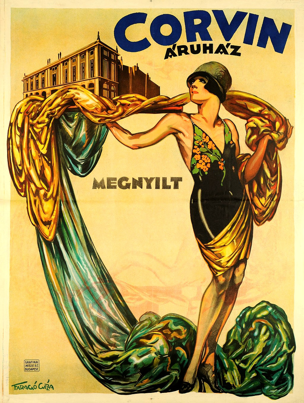 Faragó Géza Corvin plakát 1926